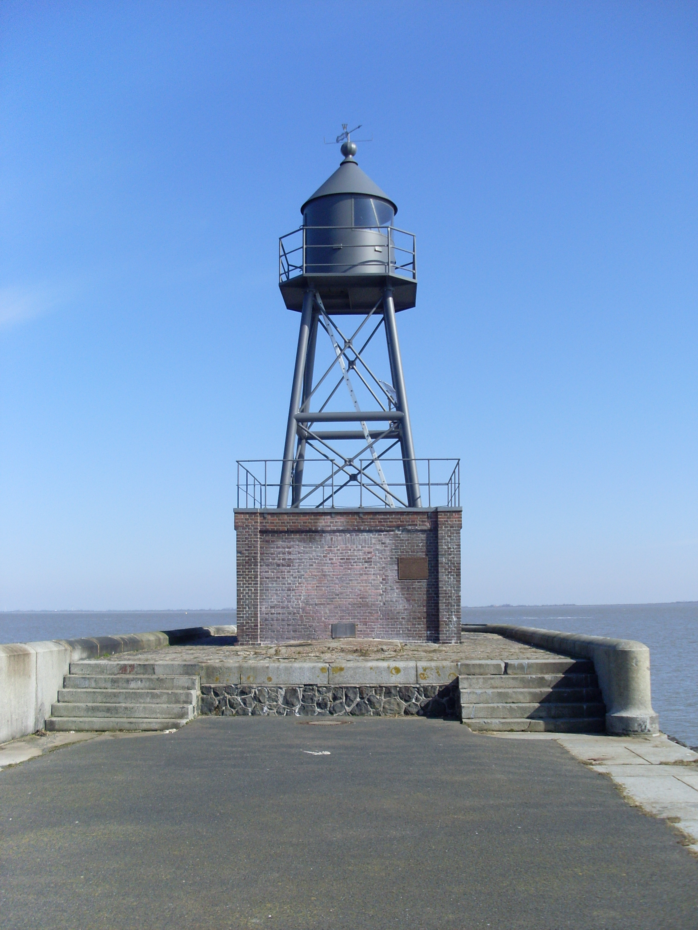 Nachdem das alte Molenfeuer nach der Stilllegung im Jahr 2005 verkauft wurde, wurde 2006 an selbiger Stelle ein neues Molenfeuer errichtet, das dem alten nachempfunden wurde.